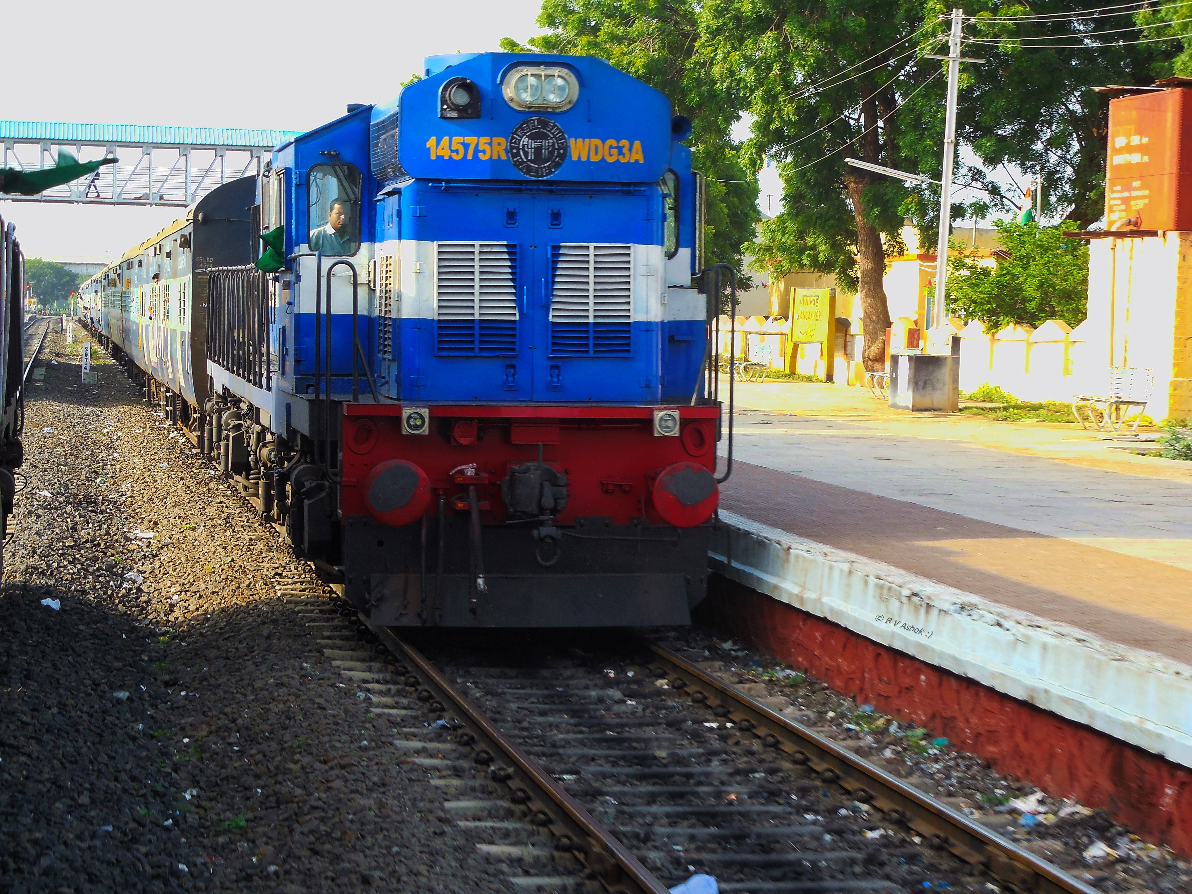 KZJ WDG-3A 14575 waiting at Gangakher with 57549 Hyderabad - Aurangabad Passenger....